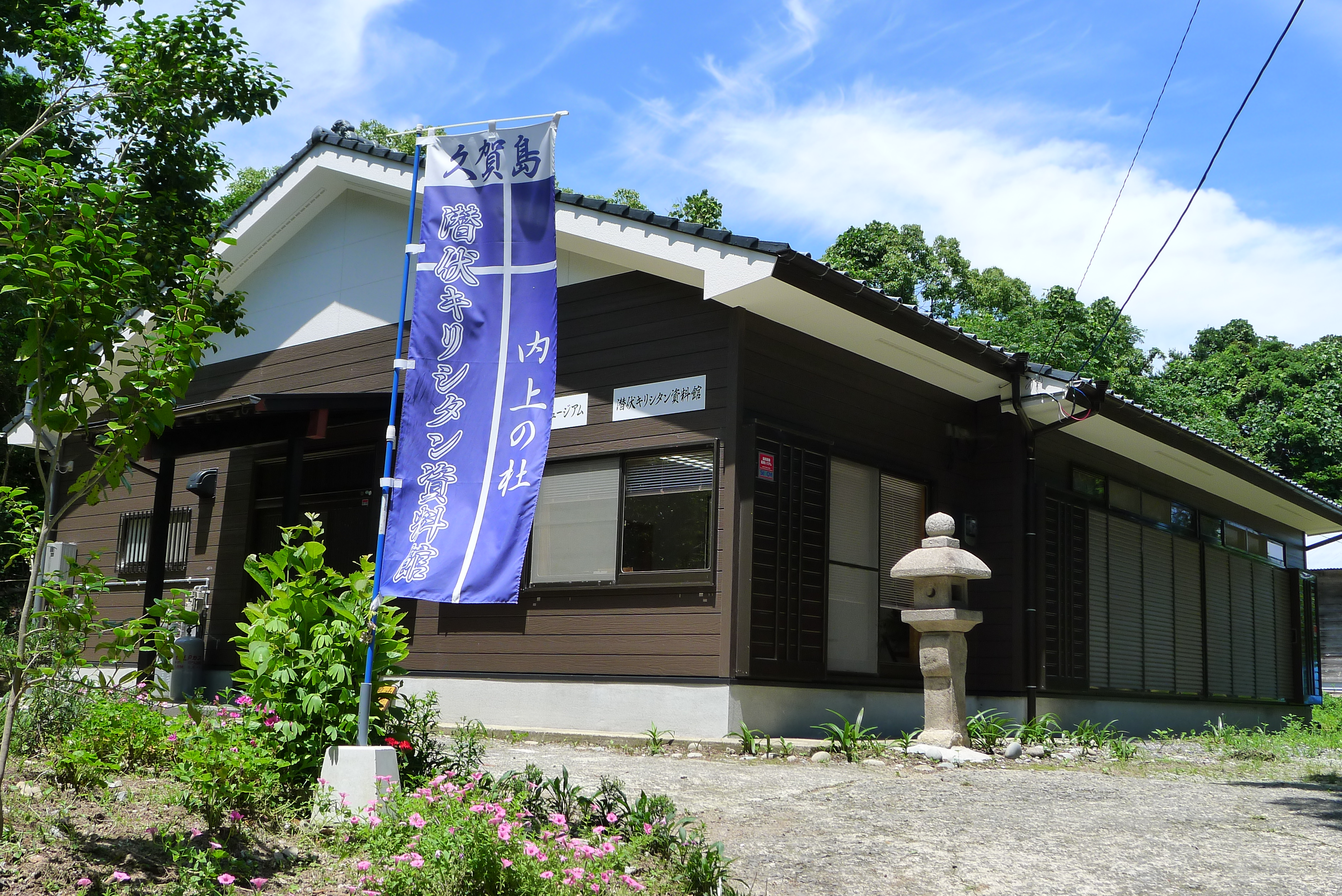 世界遺産「長崎と天草地方の潜伏キリシタン関連遺産」登録を記念し久賀島にクラウドファンディングで資金調達して建てられた潜伏キリシタン資料館